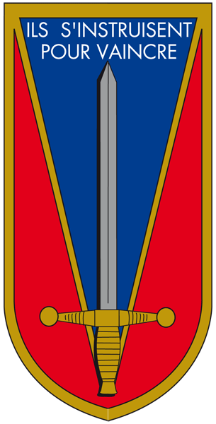 Insigne de l'ESM Saint Cyr Coetquidan.